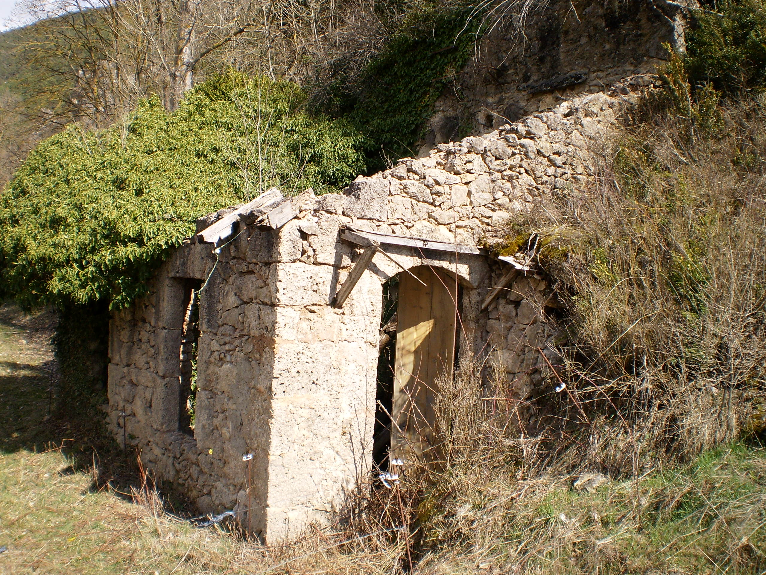 Antiga central hidroelèctrica. Va ser la primera font d'electricitat del poble.